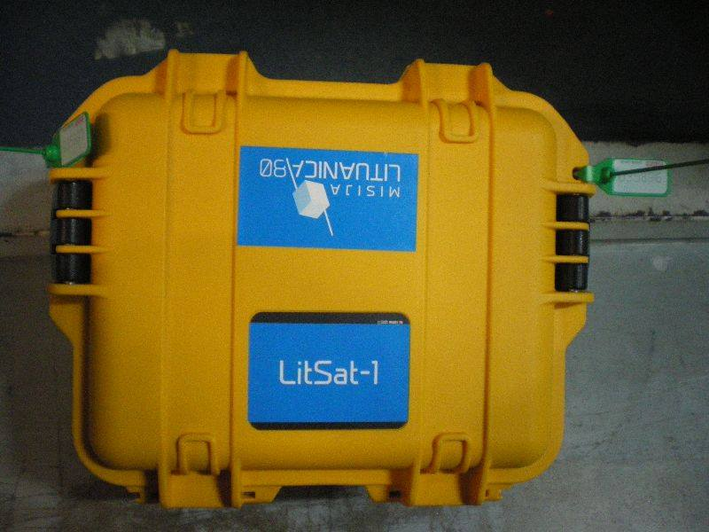 LitSat projektas